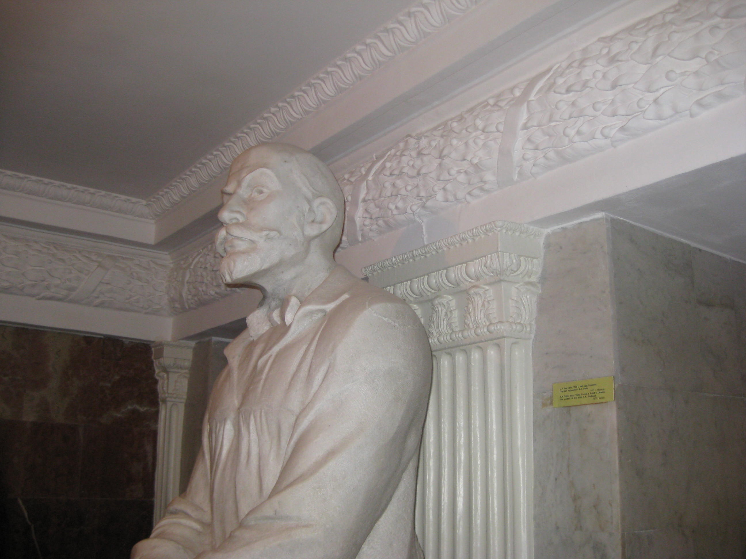 Standbeeld van Franz Roubaud, kunstschilder, in het Panoramamuseum in Sevastopol, Oekraïne